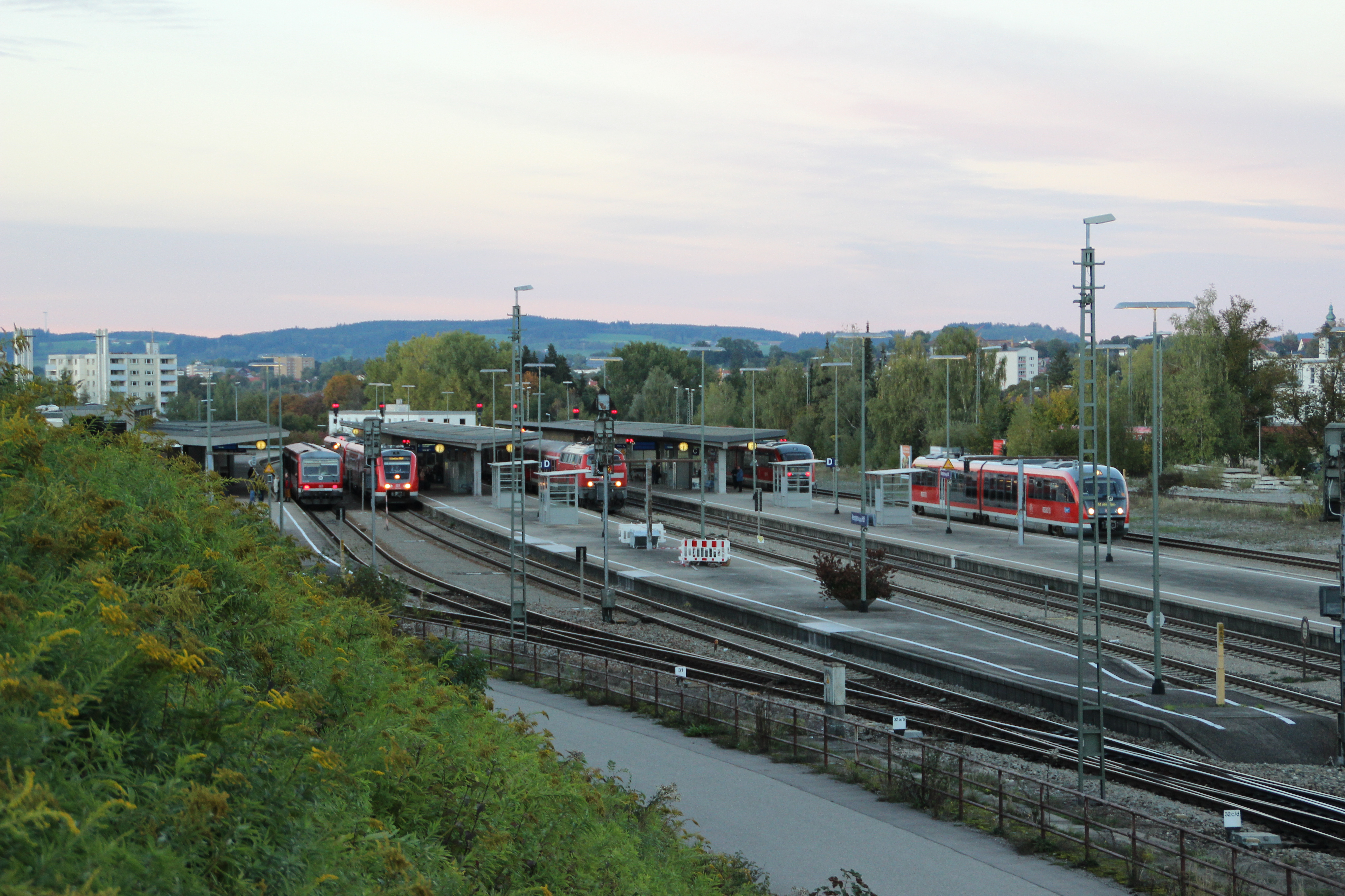 Hauptbahnhof Kempten (Allgäu) - Blick vom kleinen Grünten in Kempten